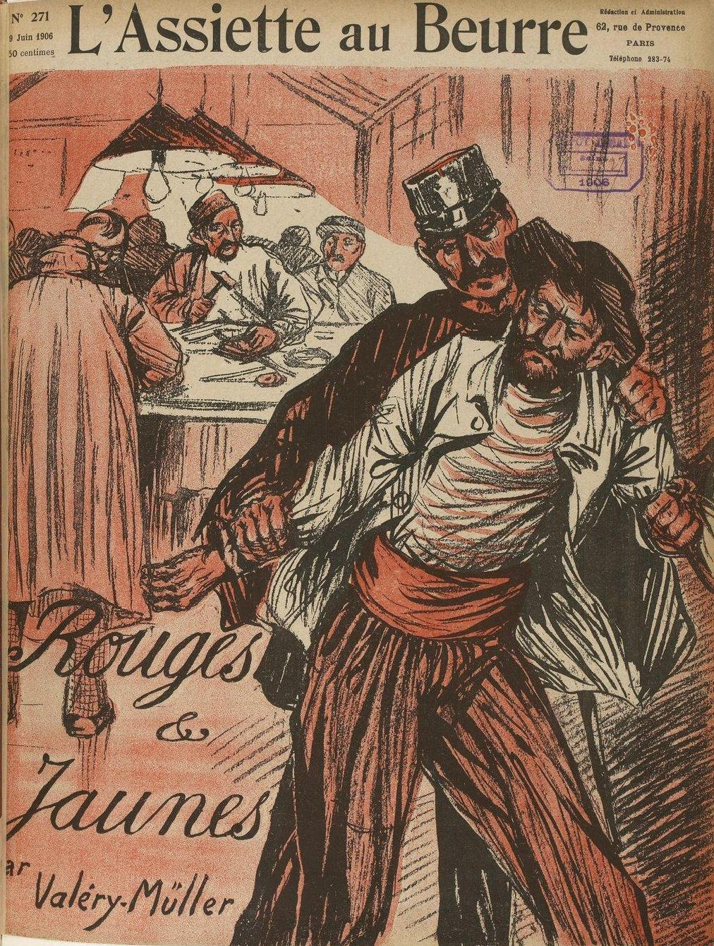 « Rouges et jaunes » par Valéry Müller in L'Assiette au beurre n° 271 du 9 juin 1906.